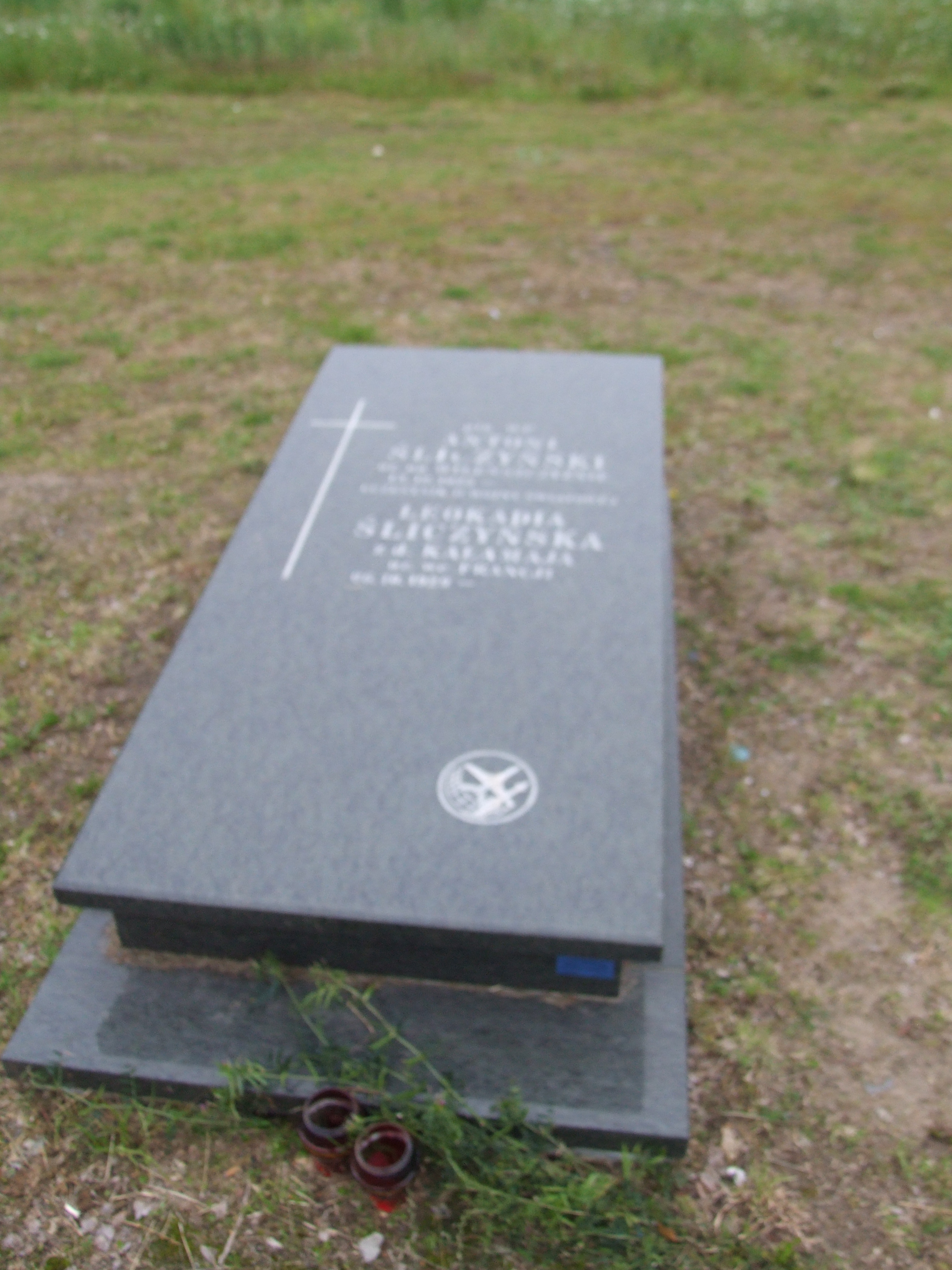 Gdynia-Oksywie Cmentarz Marynarki Wojennej